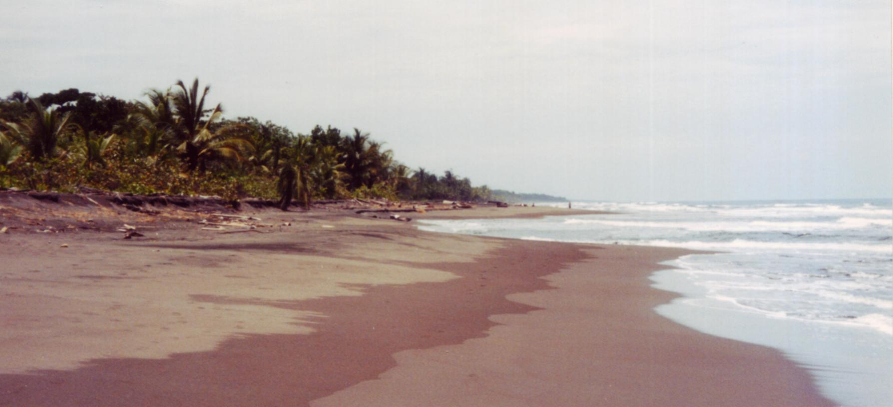 caribbean coast at Tortuguero National Park, Limón province, Costa Rica costa del mar caribe en el parque nacional Tortuguero, Provincia de Limón, Costa Rica